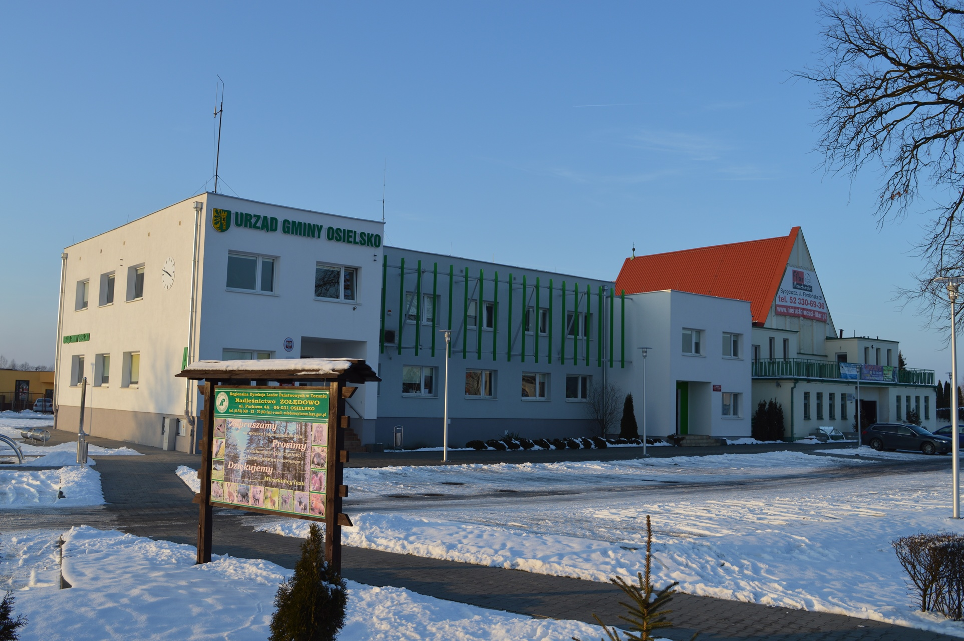 Urząd Gminy w Osielsku